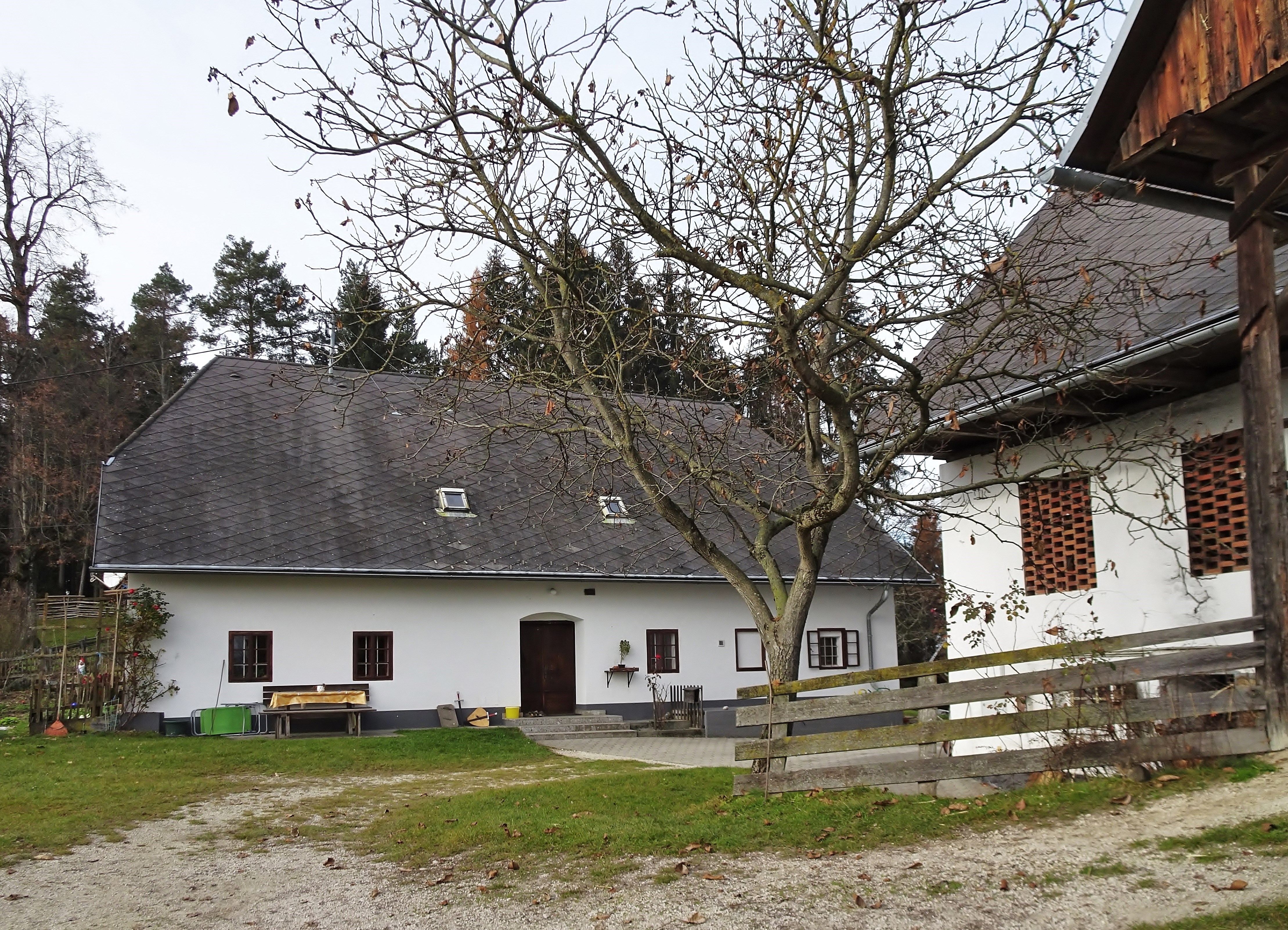 Der Rutarhof, ehemals Wohnsitz Werner Bergs, im Jahr 2015